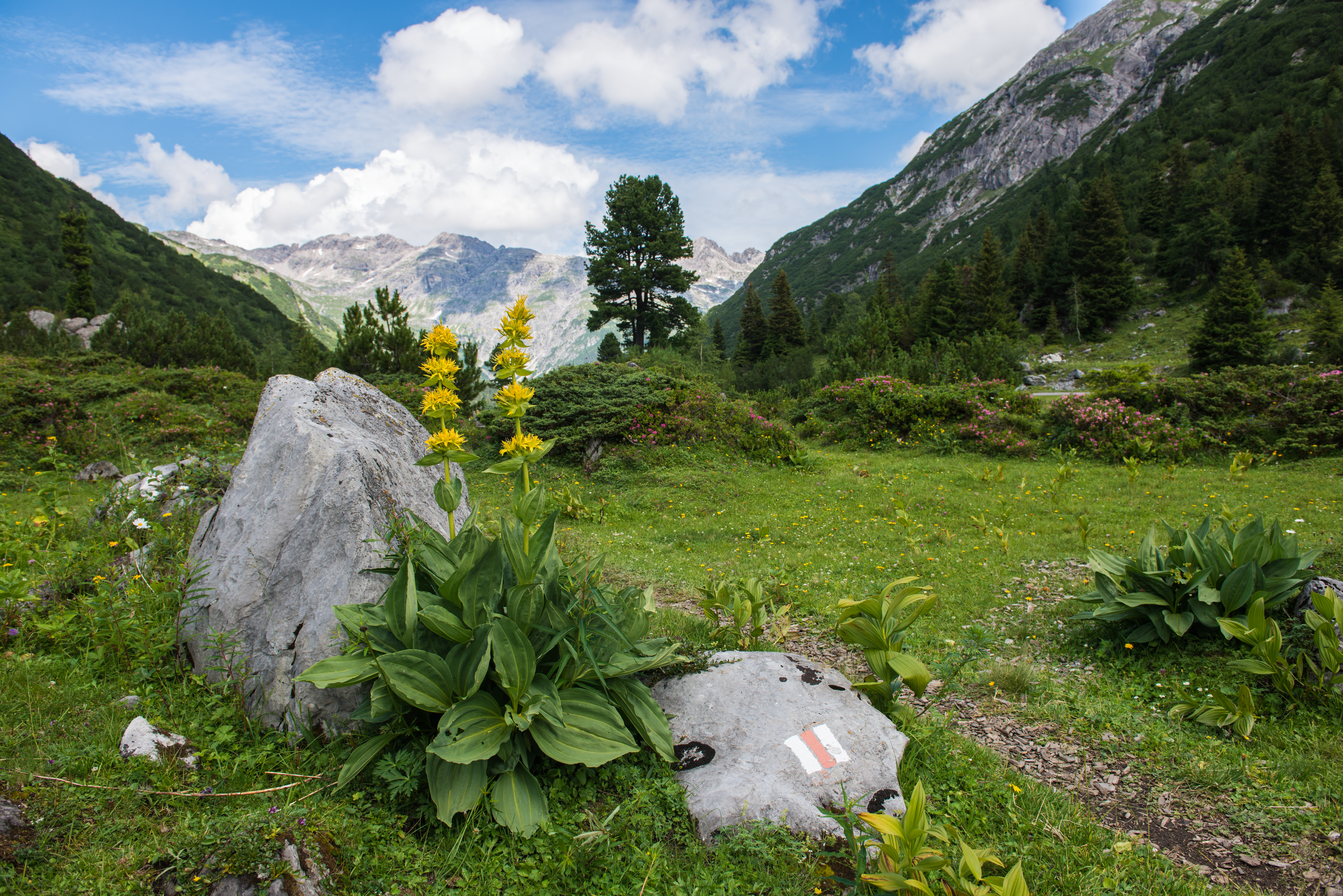 Gentiana lutea